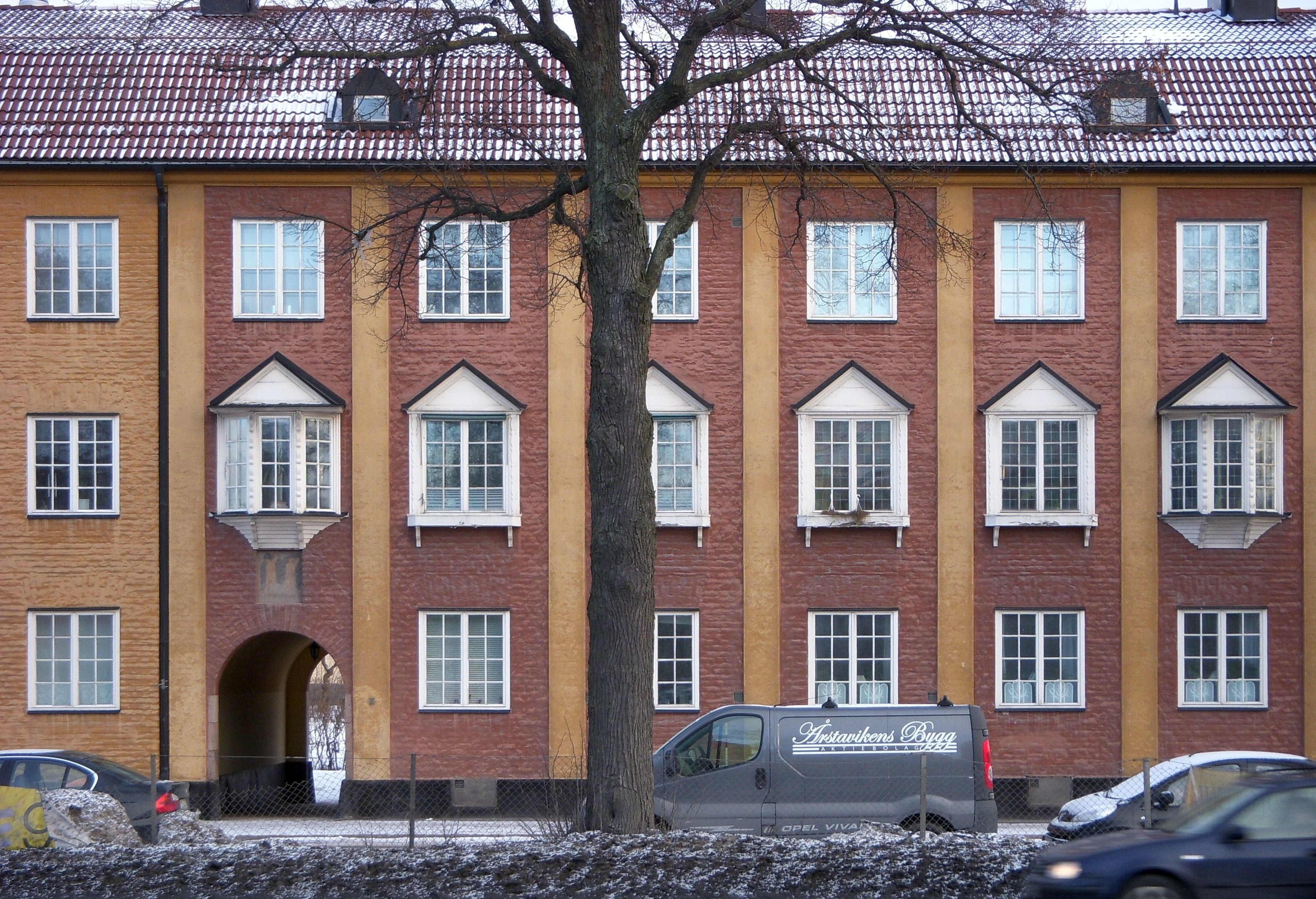 Bostadshus i kvarteret Framtiden 1, Nynäsvägen 307-315, arkitekt Cyrillus Johansson